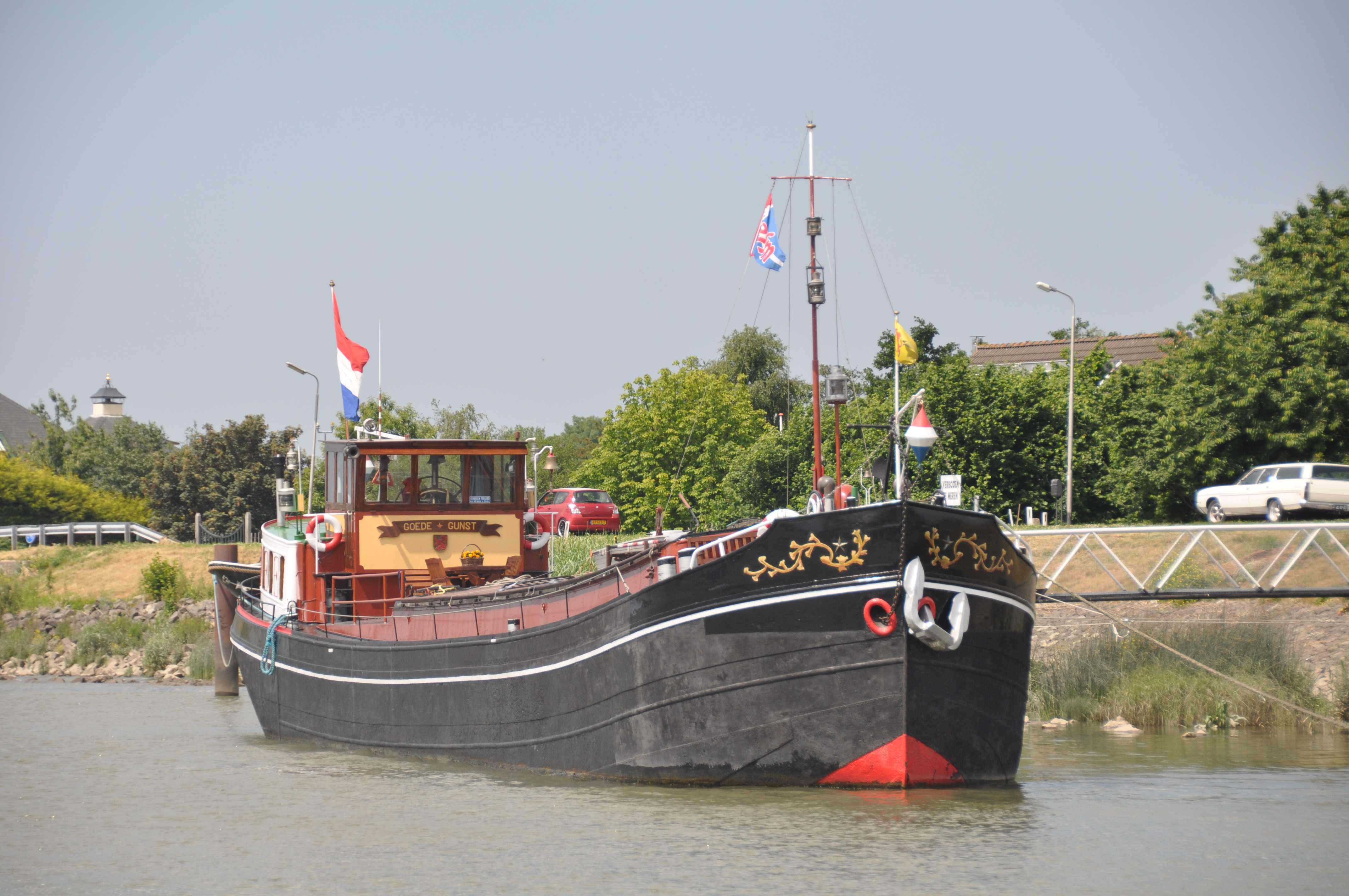 De GOEDE-GUNST voor de wal op de Hollandsche IJssel bij Ouderkerk